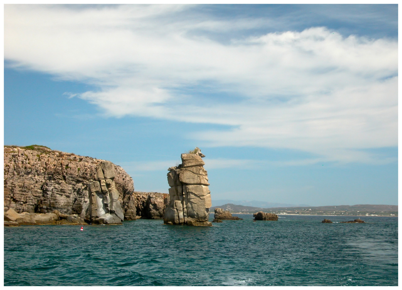 Le Colonne di Carloforte sull'Isola di San Pietro; foto da me realizzata.